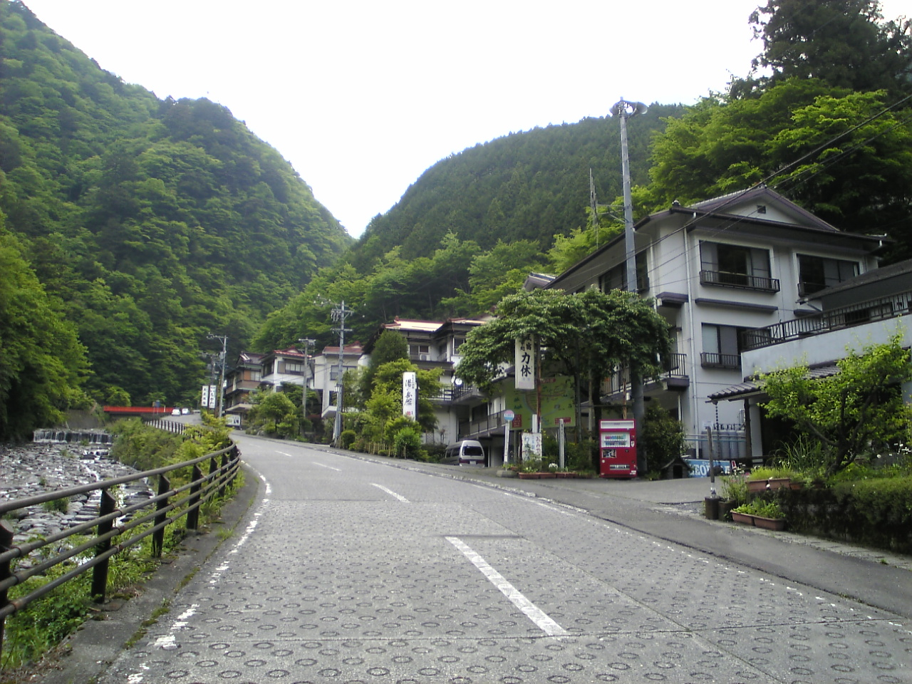 静岡県道29号梅ケ島温泉昭和線